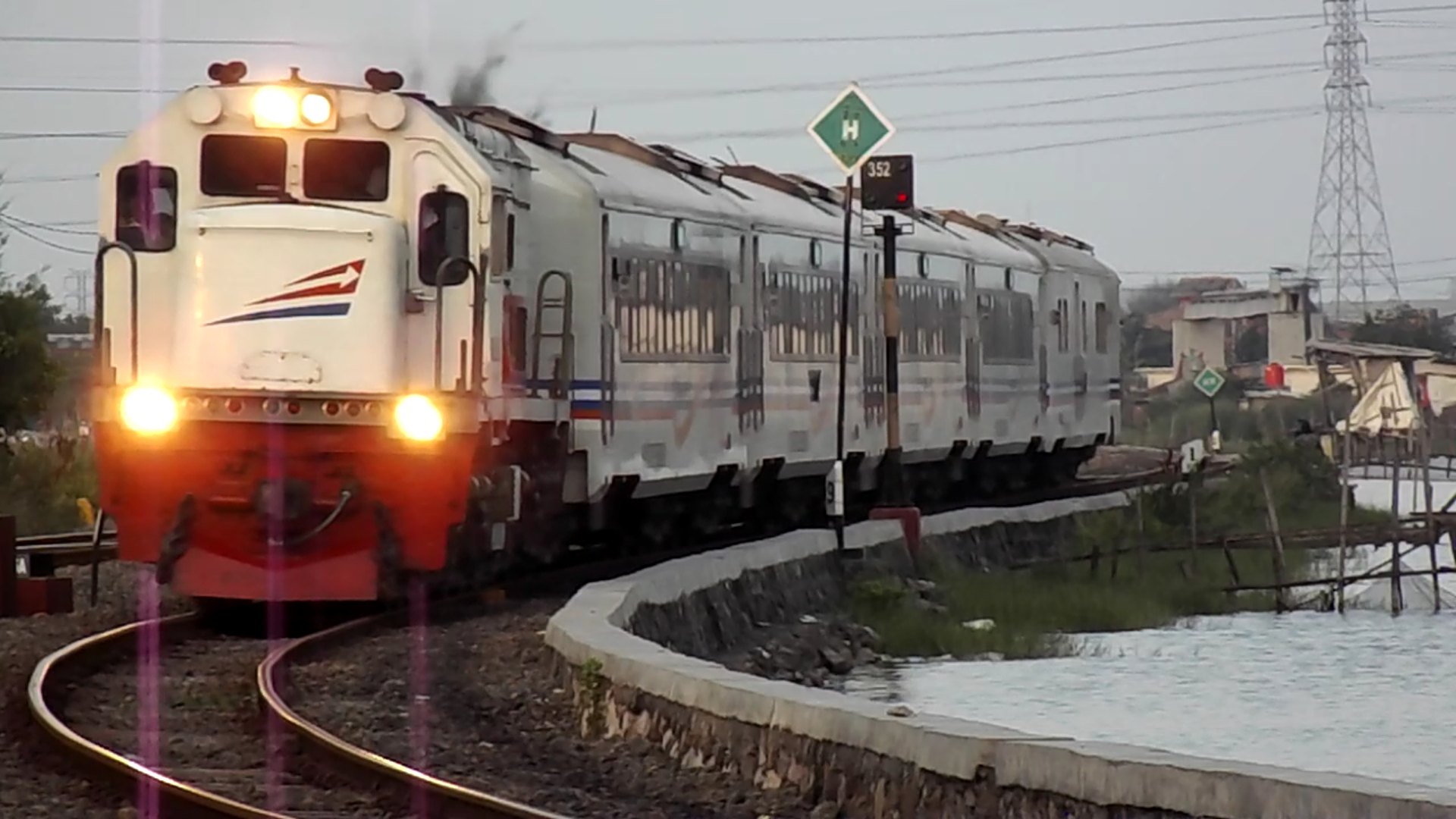 Ka 161 Ambarawa Ekspres di tambak ronggowarsito